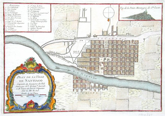 Plan de la ville de Santiago, mapa de Santiago de Chile durante el siglo XVIII. En la esquina inferior dice: Plan de la Ville de Santiago Capitale du Royaume de Chili Située par 33d. de Latit de Australe a 28 Lieues du Port de Valparaiso dans la Mer du Sud Echelle de 500 Toises En la esquina superior: Vue de la Petite Montagne de Ste. Lucie